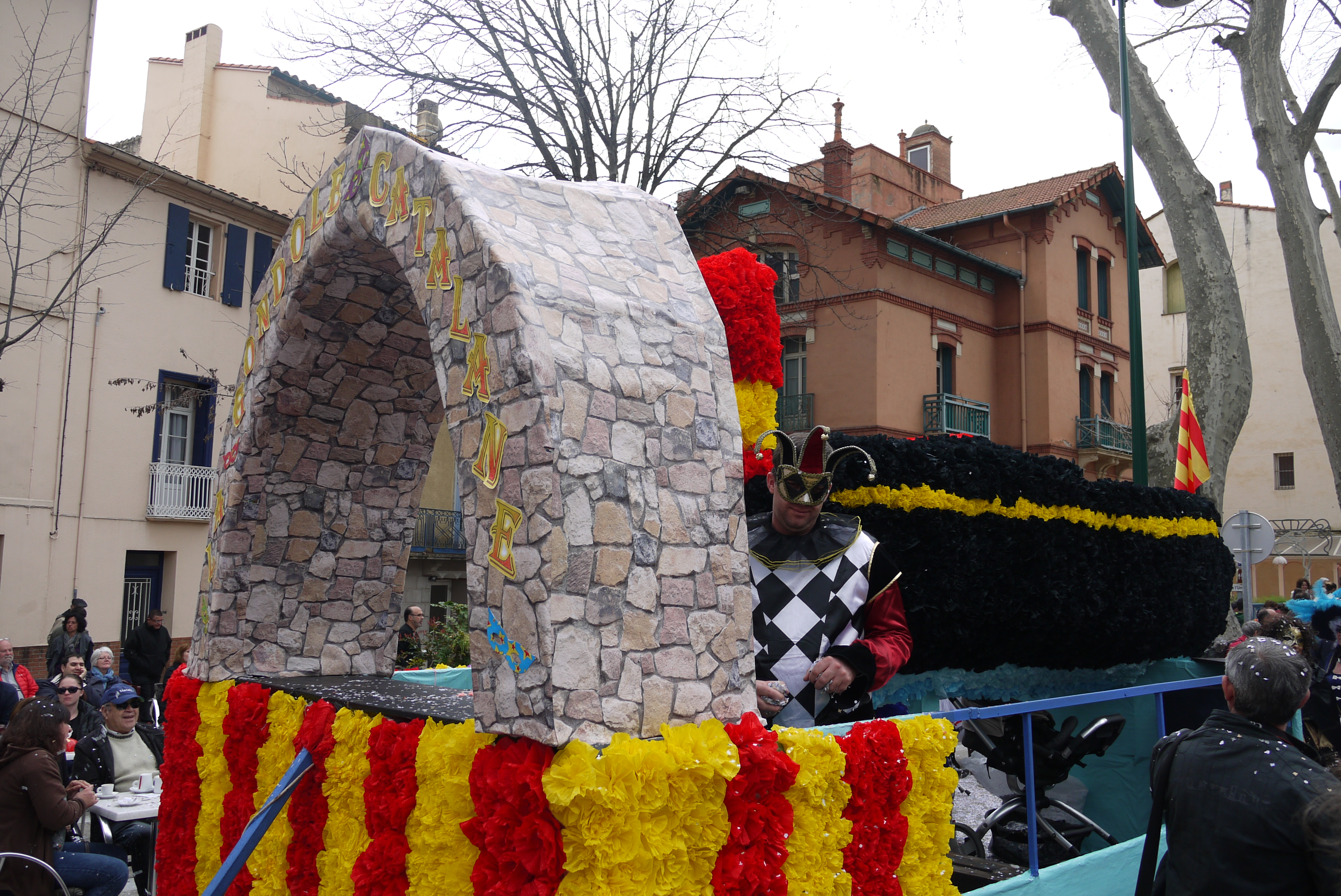 Carnaval de Céret 2017